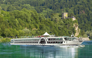 Jungfernfahrt der Amadeus Diamond, Hotelschiff auch zu Messezeiten